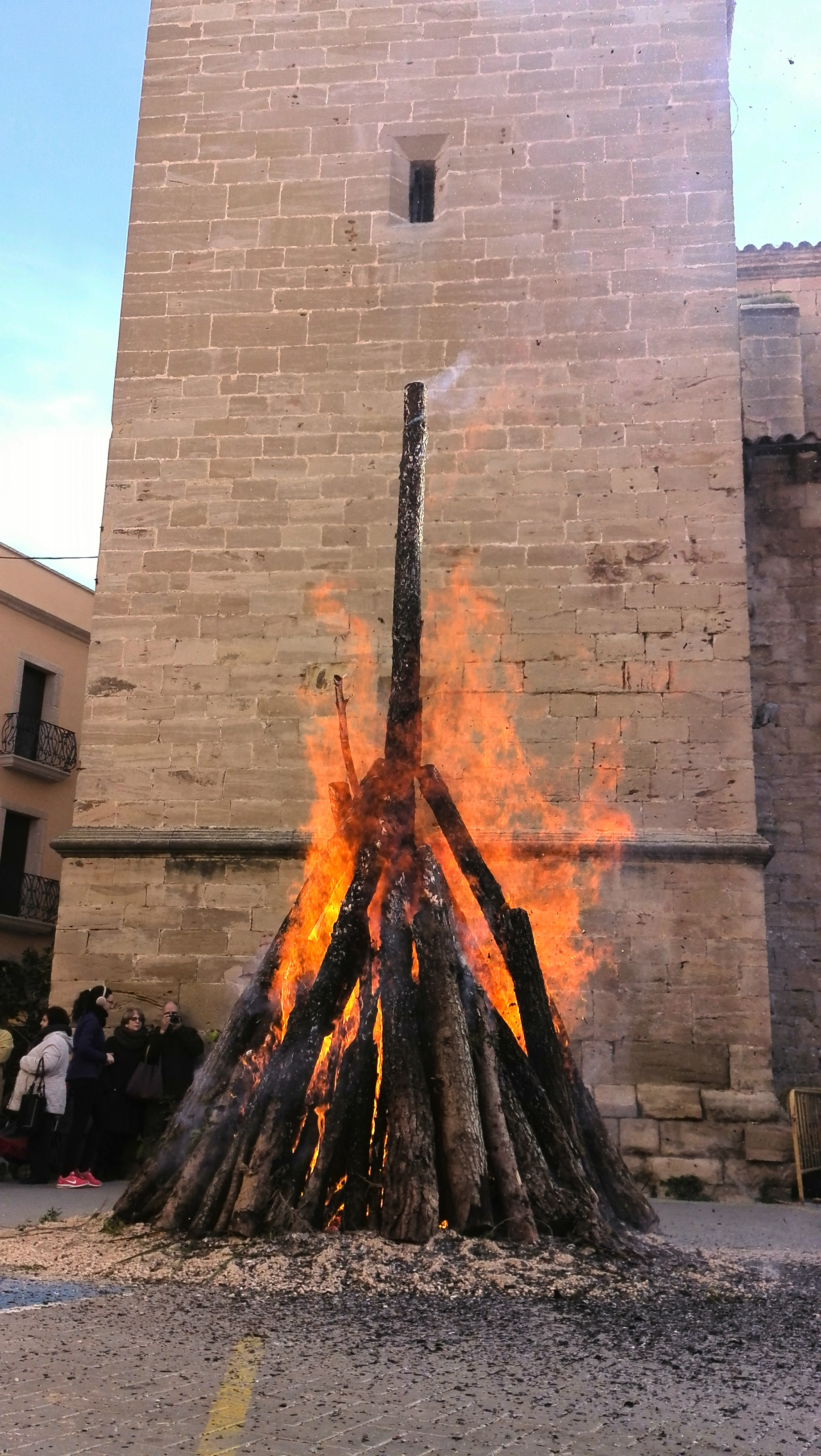 Imatge de la foguera de la Festa de sant Antoni de Gandesa, feta pels majorals el 17/01/2015 i encesa l'endemà.